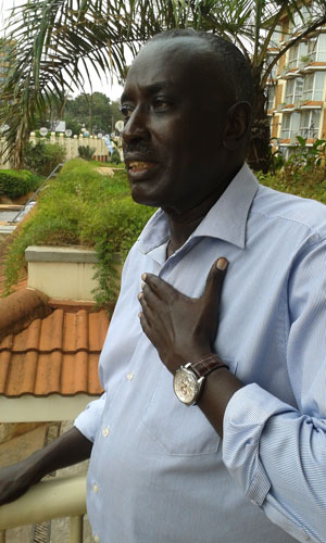 Major General Benon Biraaro in Kampala, Uganda.